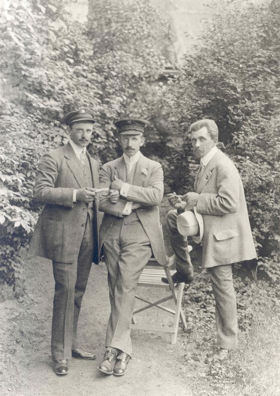 Das "Eiserne Team", Graf Schönfeldt, Eduard Fischer und Ferdinand Porsche